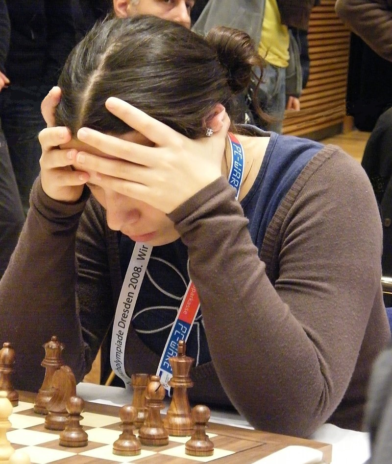 Catarina Leite bei der 38. Schacholympiade in Dresden 2008